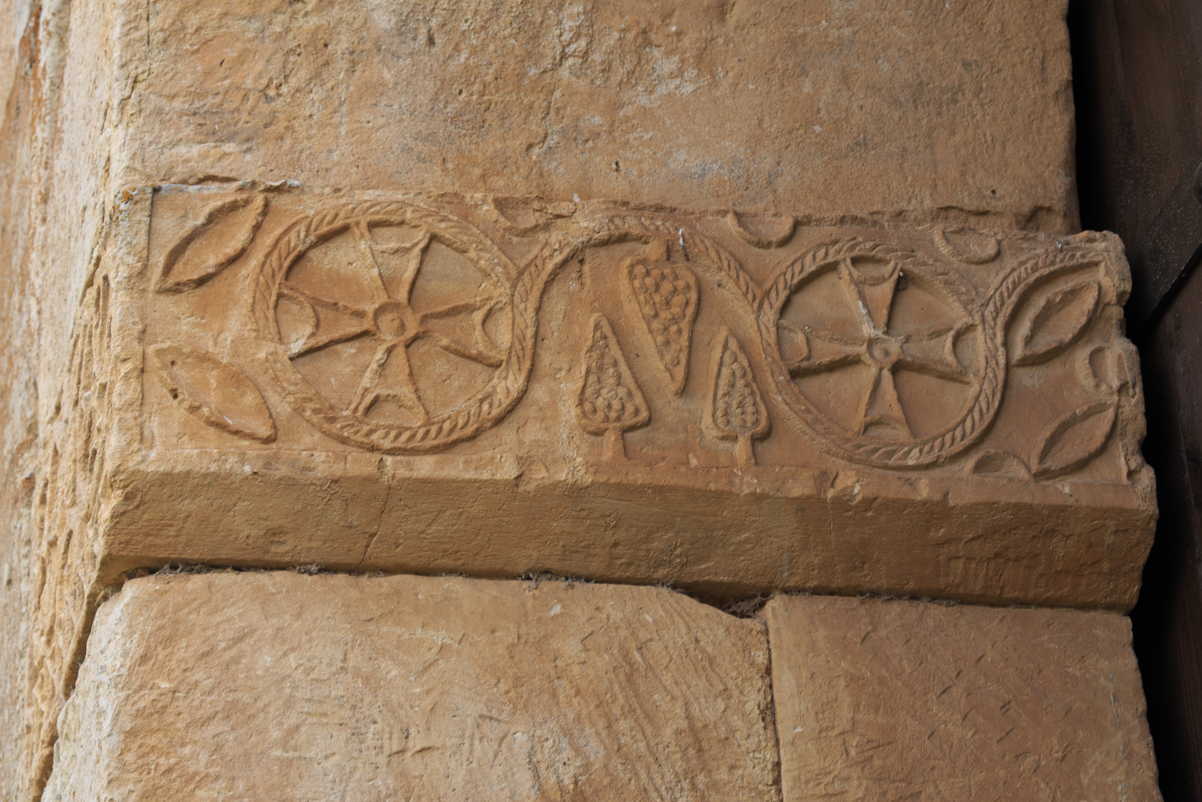 Kirche San Pedro de la Nave in El Campillo, einem Ort in der Gemeinde San Pedro de la Nave-Almendra in der Provinz Zamora (Kastilien-León/Spanien), Kämpfer mit Verzierung